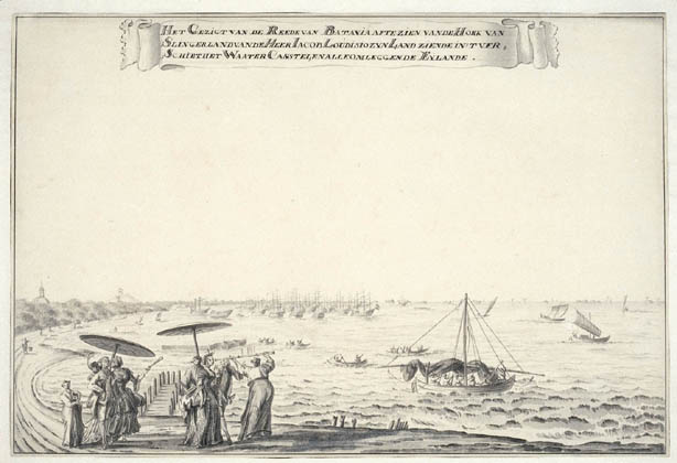 Het Gezigt van de Reede van Batavia afte zein van de hoek van Slingerland vand de heer Iacob Loudicio zijn land zeinde in t'ver Schiet het waater casstel en alle omleggende Eylande.